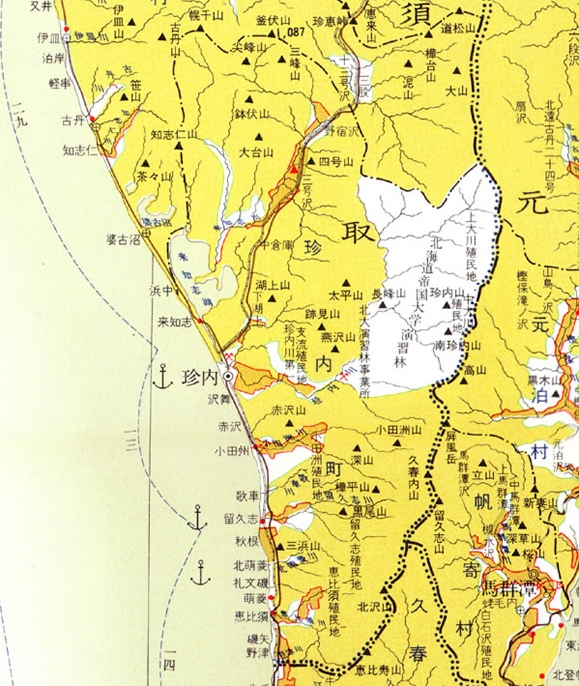 карта муниципалитета Chinnai, уезда Esutori, губернаторства Карафуто.